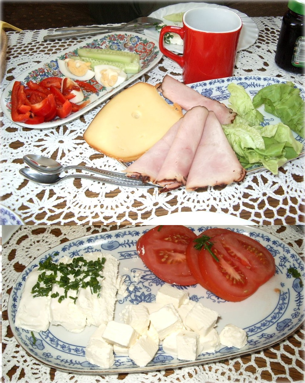 petit déjeuner polonais (exemple)